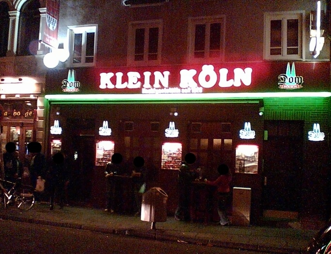 Klein Köln (Kölns erste Kneipe mit Tag- und Nachtlizenz)